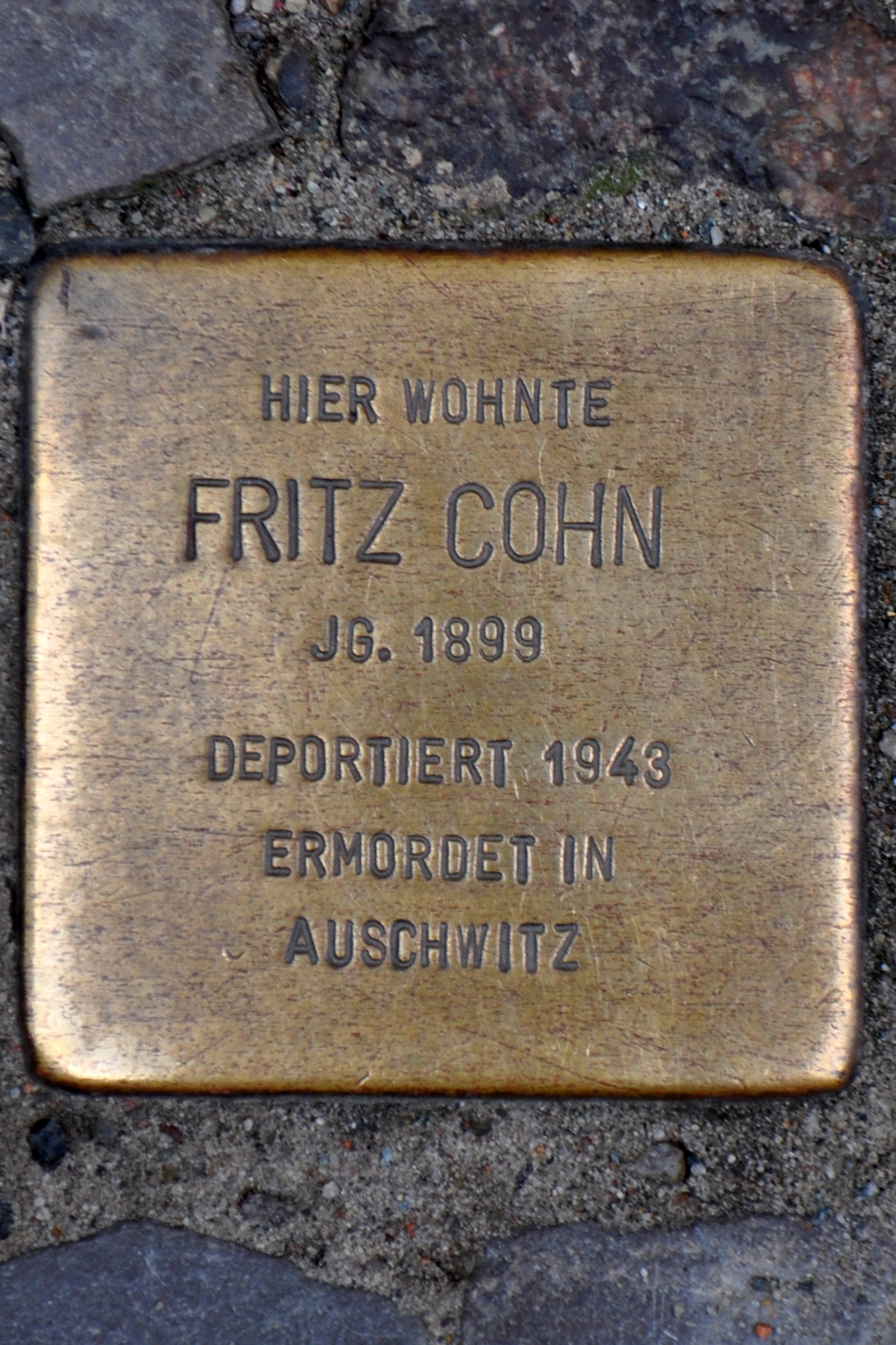 Stolperstein in Stralsund, Ossenreyerstraße 21/22. Der Stolperstein ist einer von fünf Stolpersteinen an dieser Adresse. Text: Hier wohnte Fritz Cohn Jg. 1899 deportiert 1943 ermordet in Auschwitz